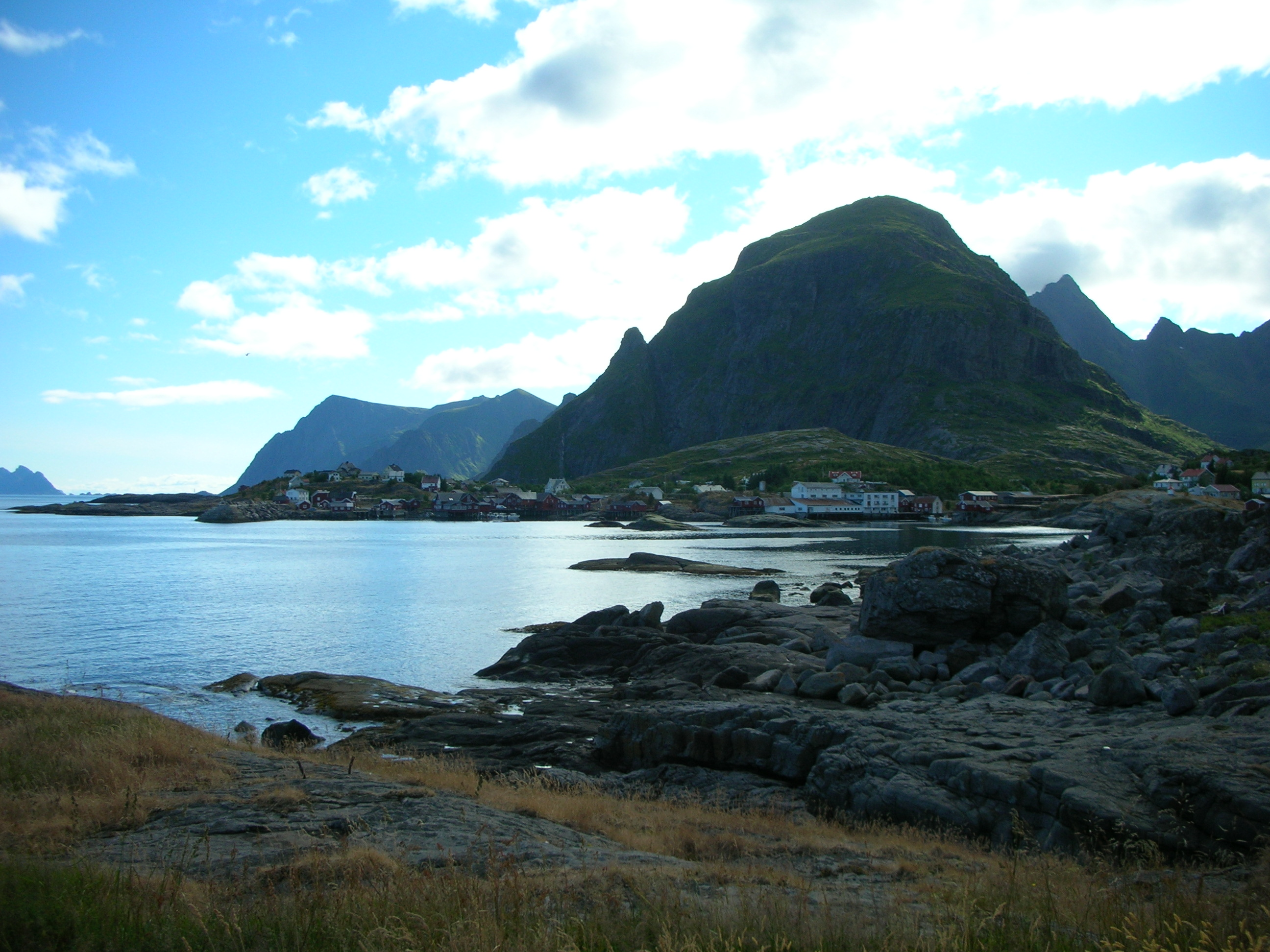 Moskenesøya med Ä